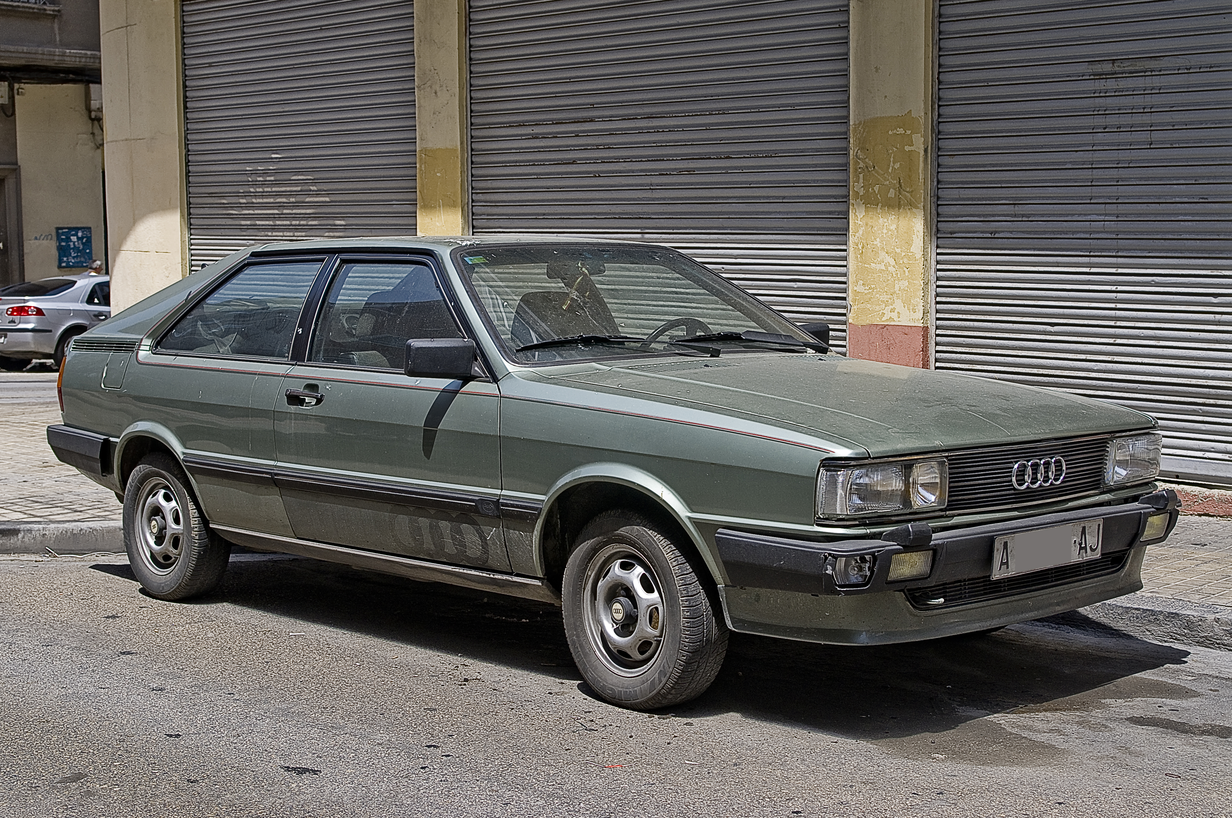 1984 Audi Coupé GT